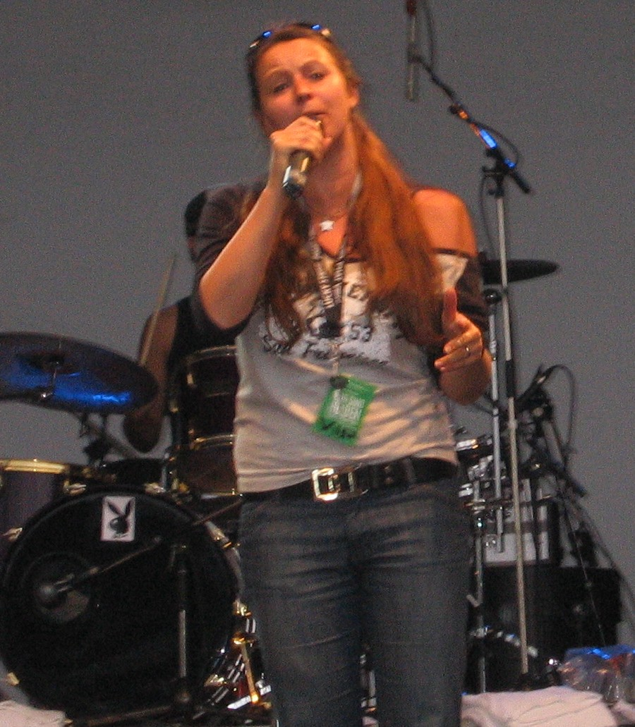 Cora E. im Vorprogramm von Wir sind Helden beim Open Air im Weinheimer Sepp-Herberger-Stadion